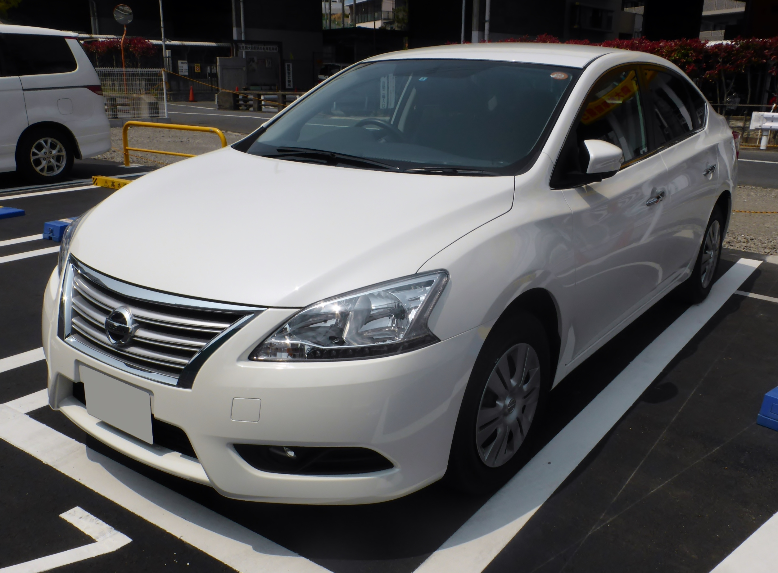 B17型日産・シルフィSをフロントから撮影。